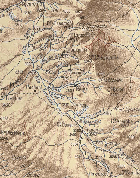 Cuenca alta del río San Jose de Azapa